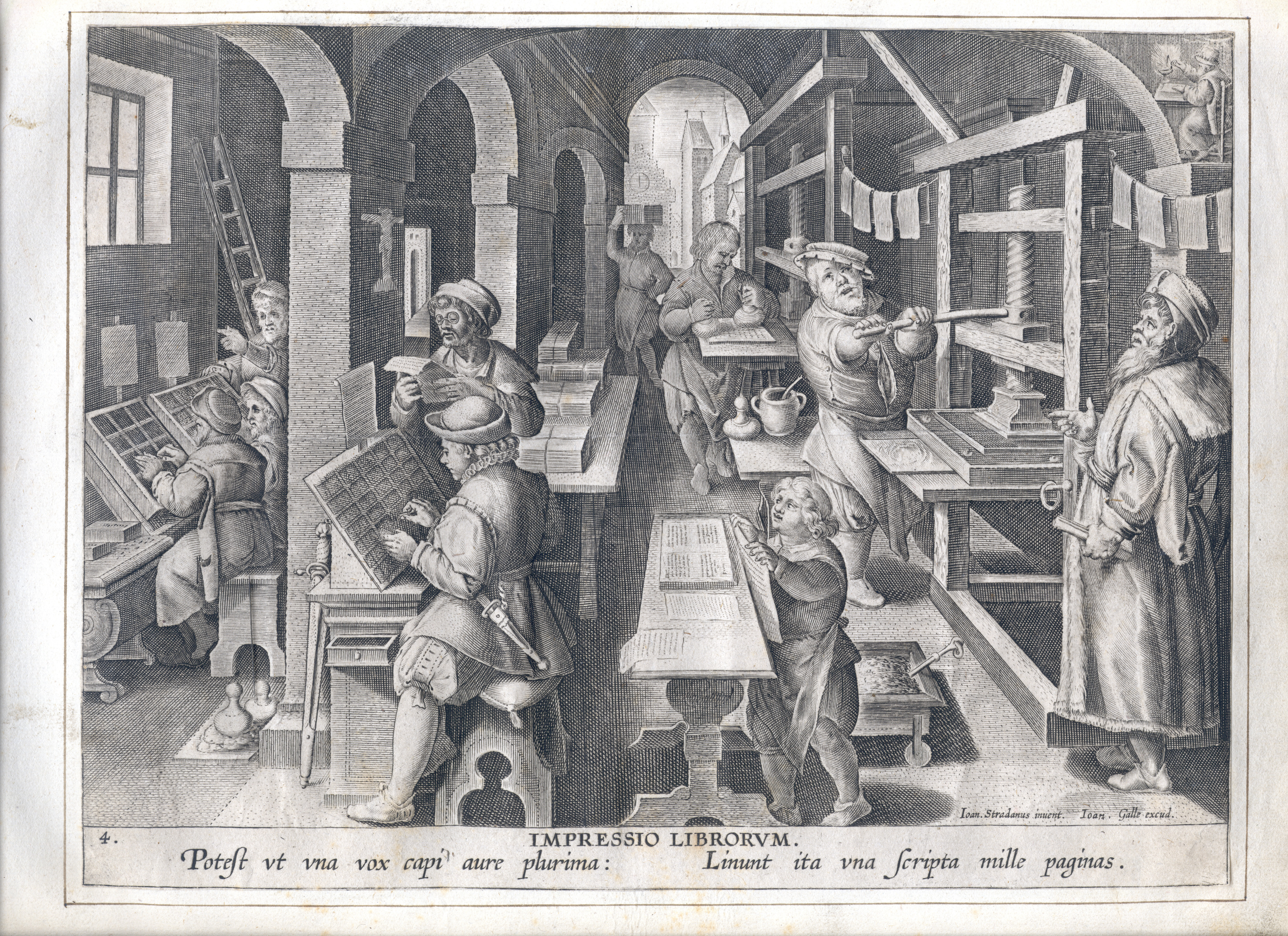 anonymous: The invention of book printing Artist anonymous Designer Stradanus (1523–1605) Alternative names Jan van der Straet, Giovanni della Strada, Johannes della Strada, Giovanni Stradano, Johannes Stradano, Giovanni Stradanus, Johannes Stradanus, Jan van Straeten, Jan van StratenDescriptionFlemish painter and draughtsmanDate of birth/death 1523 2 November 1605 Location of birth/death Bruges FlorenceWork location Antwerp (1545), Florence (circa 1550-1605), Rome (circa 1550-1553), Montemurlo (1590)Authority control : Q143595 VIAF: 29699451 ISNI: 0000 0000 8108 906X ULAN: 500011304 LCCN: n84804240 NLA: 35875335 WorldCat creator QS:P170,Q143595 Title De uitvinding van de boekdrukkunstPublisher Jan Galle Object type engraving Description Gravure , anoniem, Museum Plantin-MoretusMedium gravureCollection Museum Plantin-Moretus Native nameMuseum Plantin-MoretusLocationAntwerpCoordinates51° 13′ 05.86″ N, 4° 23′ 53.39″ E Established1877 Web page control : Q595802 VIAF: 130668175 ISNI: 0000 0001 2285 9666 LCCN: n50051109 UNESCO: 1185 GND: 1007736-4 WorldCat institution QS:P195,Q595802Accession number PK OPB 0186 005References described at URL: Source/Photographer Museum Plantin-Moretus Native nameMuseum Plantin-MoretusLocationAntwerpCoordinates51° 13′ 05.86″ N, 4° 23′ 53.39″ E Established1877 Web page control : Q595802 VIAF: 130668175 ISNI: 0000 0001 2285 9666 LCCN: n50051109 UNESCO: 1185 GND: 1007736-4 WorldCat institution QS:P195,Q595802Permission(Reusing this file) This file is made available under the Creative Commons CC0 1.0 Universal Public Domain Dedication. The person who associated a work with this deed has dedicated the work to the public domain by waiving all of their rights to the work worldwide under copyright law, including all related and neighboring rights, to the extent allowed by law. You can copy, modify, distribute and perform the work, even for commercial purposes, all without asking permission. Gravure , anoniem, Museum Plantin-Moretus